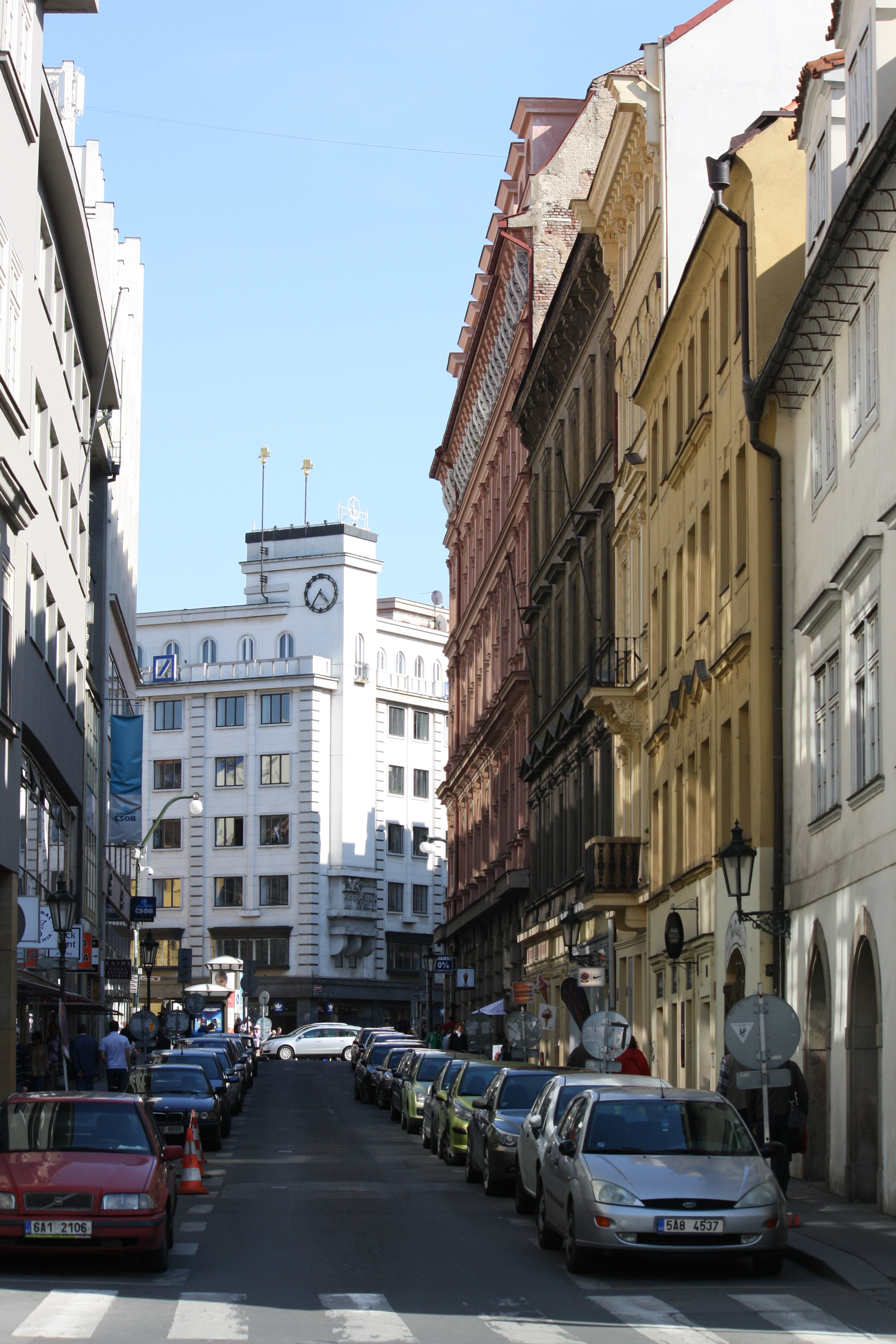 Perlová ulice od uhelného trhu